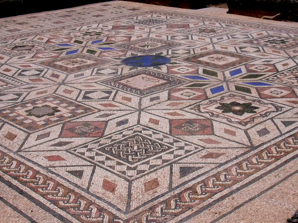 Mosaico romano de Clunia